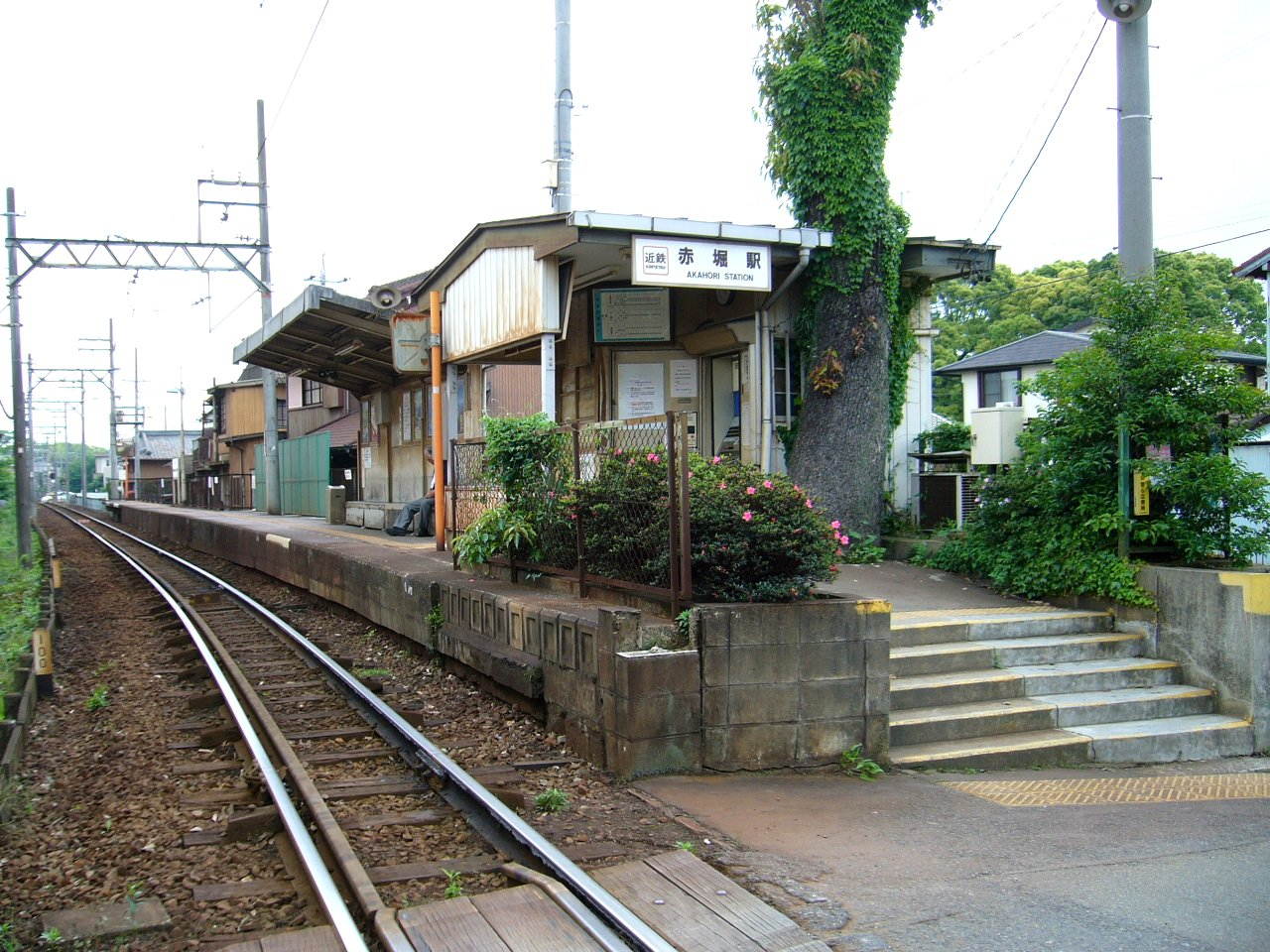 近鉄内部線 赤堀駅